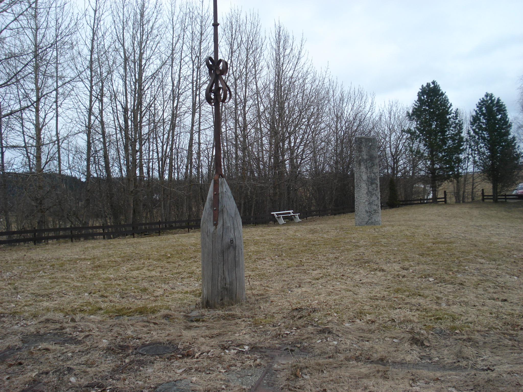 Gammle kyrkjegarden på Tiller ved kanten av leirraset frå 1816